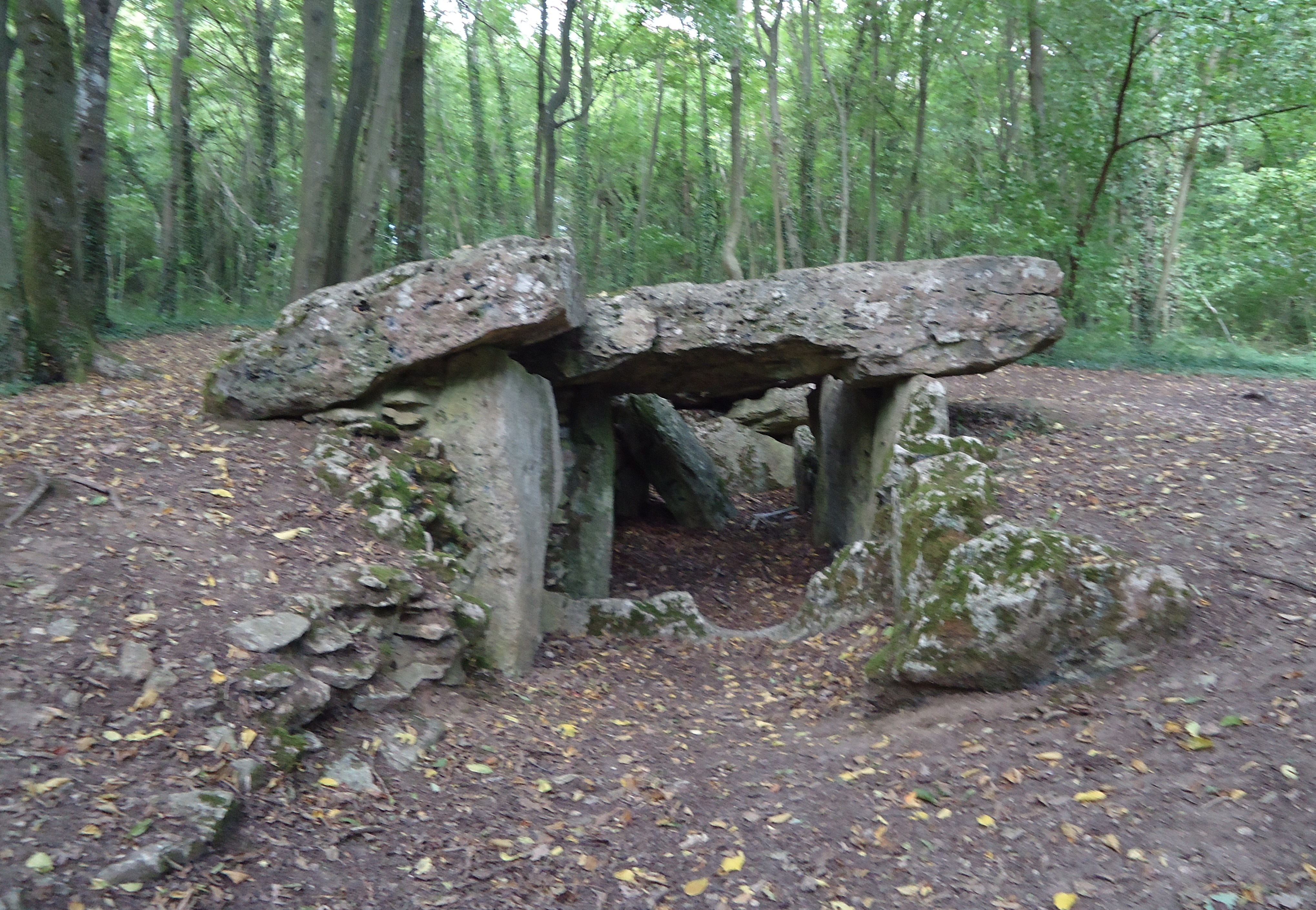 Allée Couverte d'Aveny, Neolithique récent